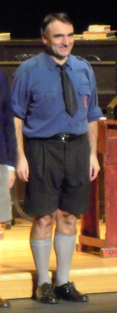 O actor galego Alfonso Agra na representación da obra O florido pénsil, no Pazo da Cultura de Pontevedra